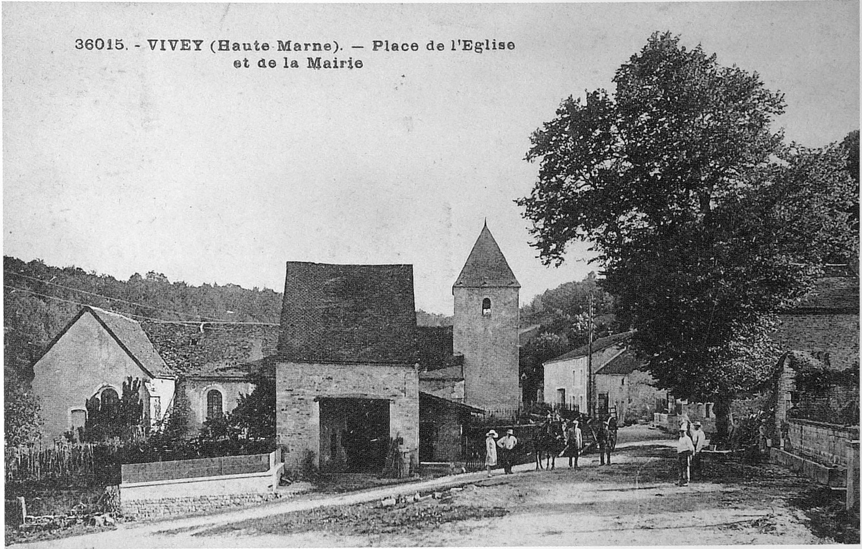 sur une vue du début du XXe siècle.